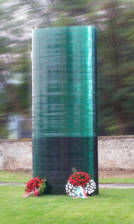 Obelisk nádeje v Parku ušľachtilých duší vo Zvolene